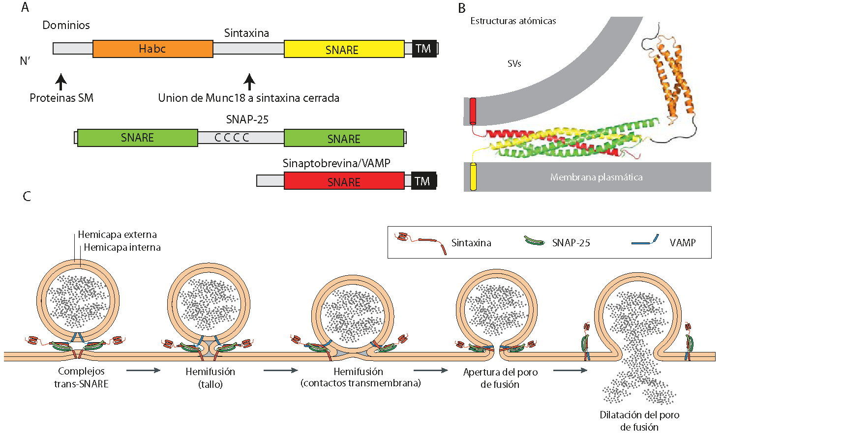 SNARE proteins structure and proposed complex model